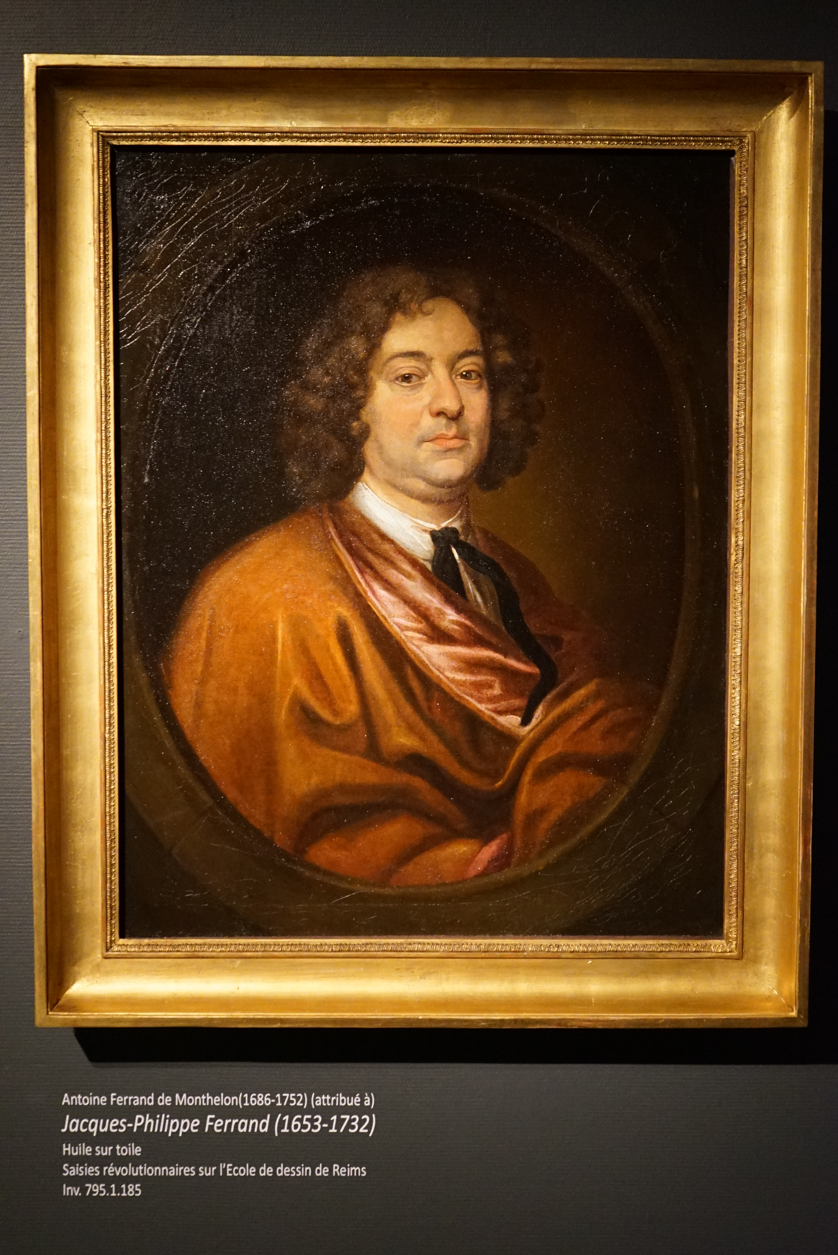 Jacques-Philippe Ferrand, , peut-être peint par son fils Antoine Ferrand de Monthelon ? 85,3 X 64,2 cm, huile sur toile.